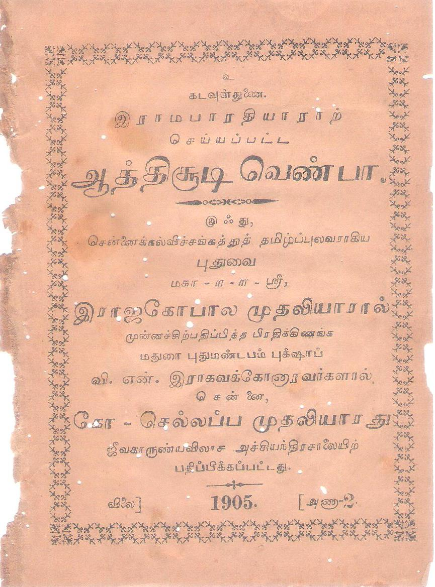 Attisudi Venba is a literature written by RamaBharati, printed in 1905. ஆத்திசூடி வெண்பா என்னும் இலக்கியம் இராமபாரதி என்பவரால் இயற்றப்பட்டு 1905 ஆம் ஆண்டு பதிப்பிக்கப்பட்டுள்ளது.